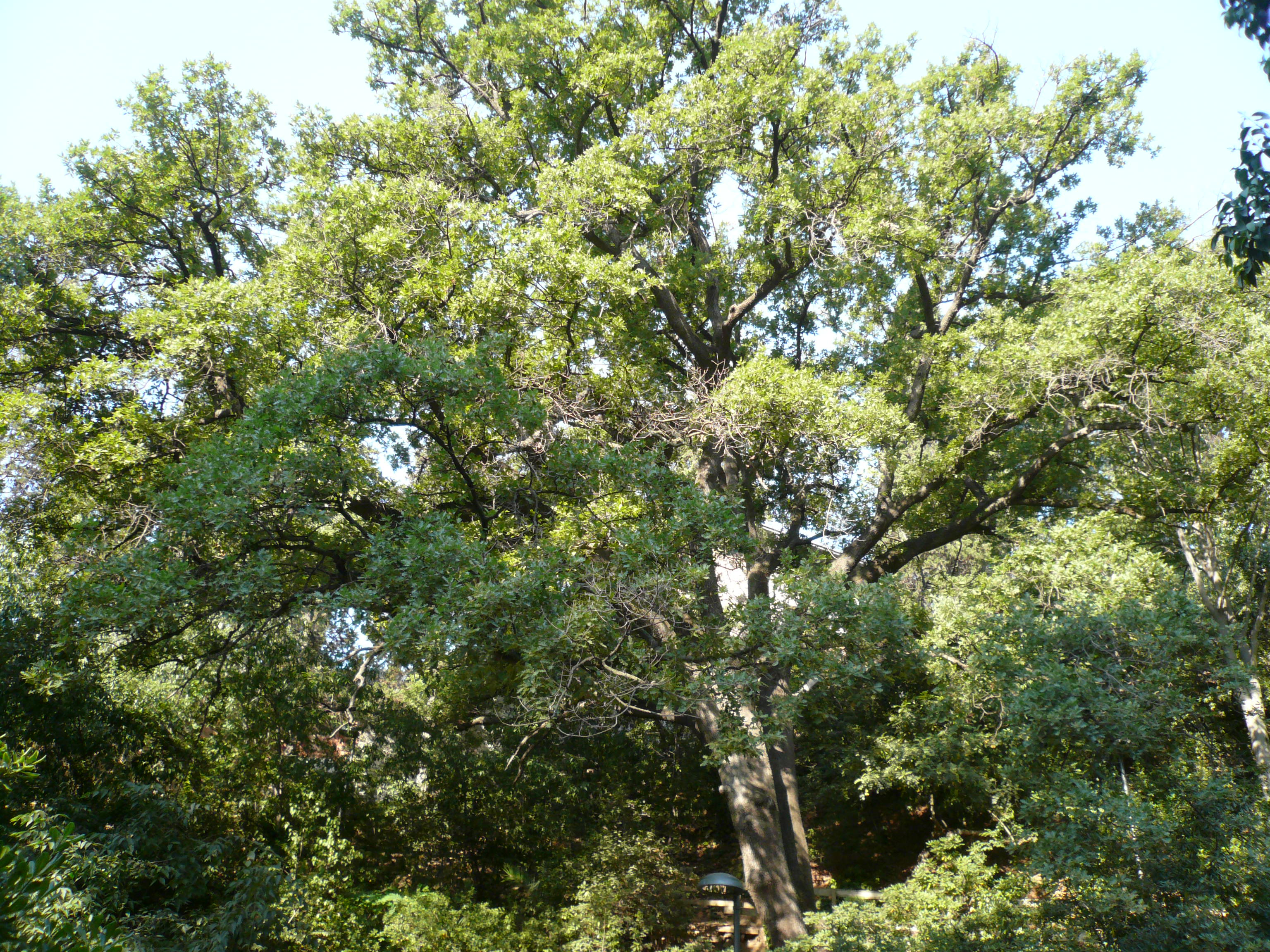 Roure cerrioide del parc de la Font del Racó